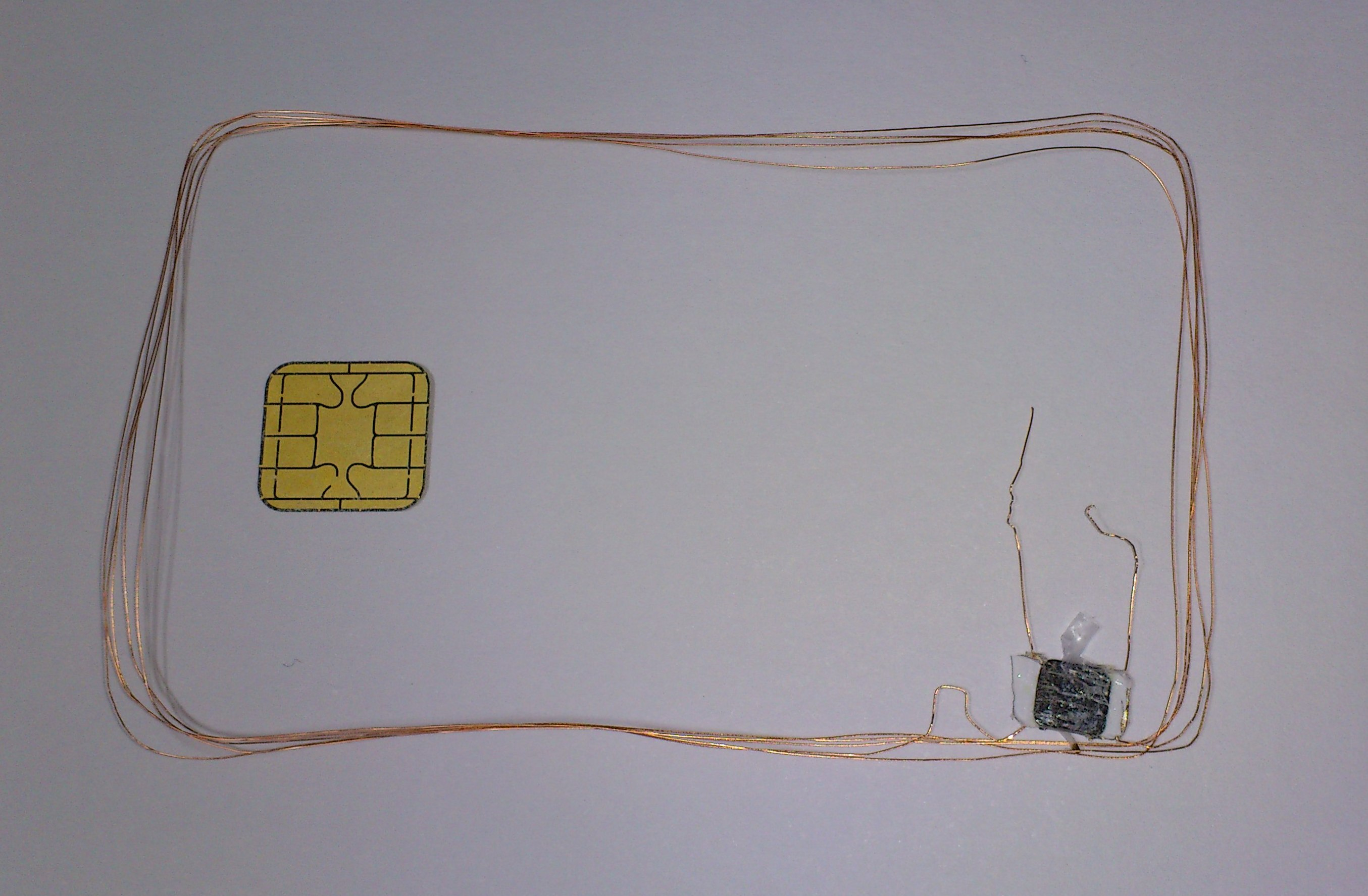 하이브리드형 IC카드. 비접촉식 거래용 IC칩과 접촉식 거래용 IC칩이 별도로 존재하는 카드이다.